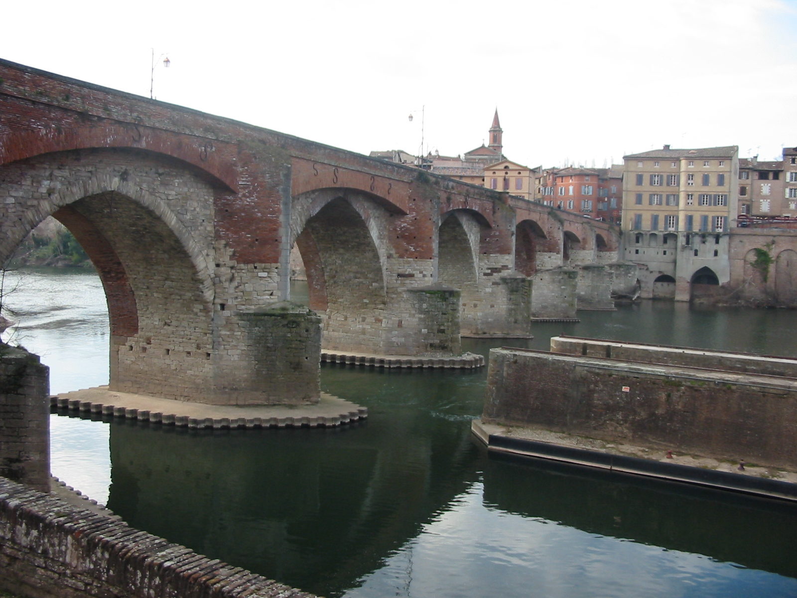 Le Vieux pont d'Albi, vu de la rive gauche du Tarn.